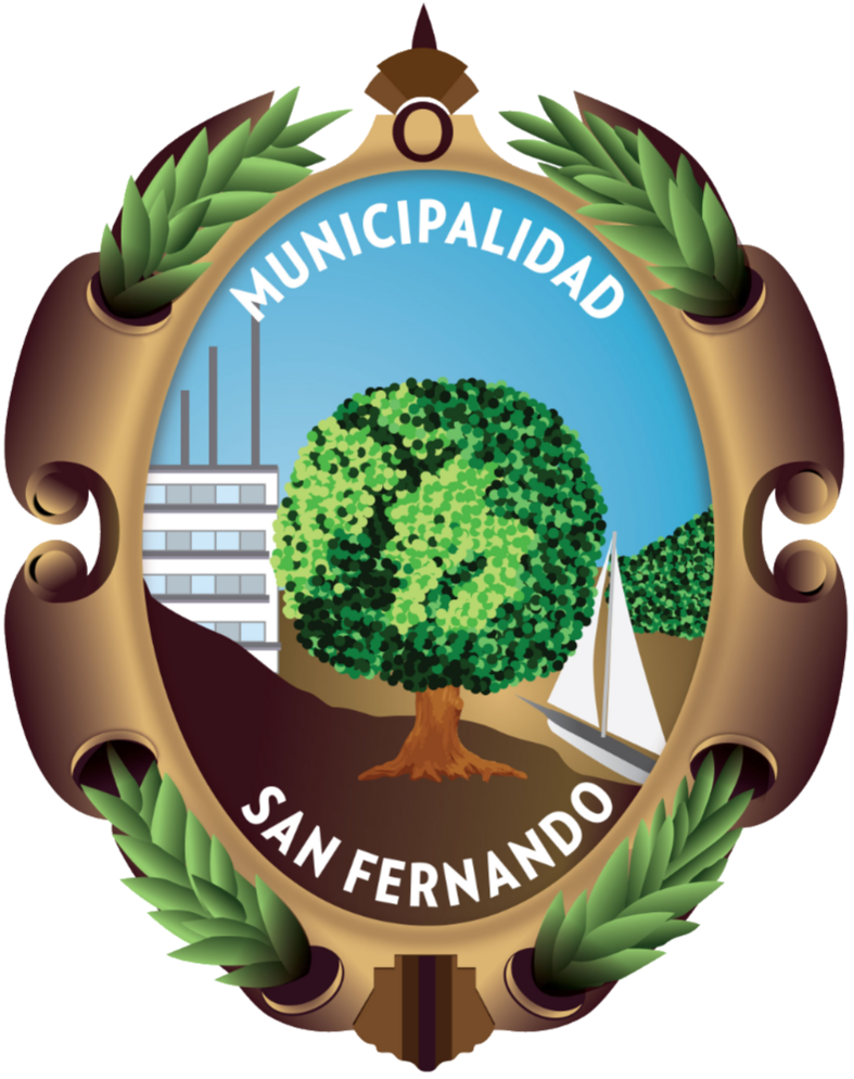 Escudo del partido de San Fernando, provincia de Buenos Aires, Argentina.